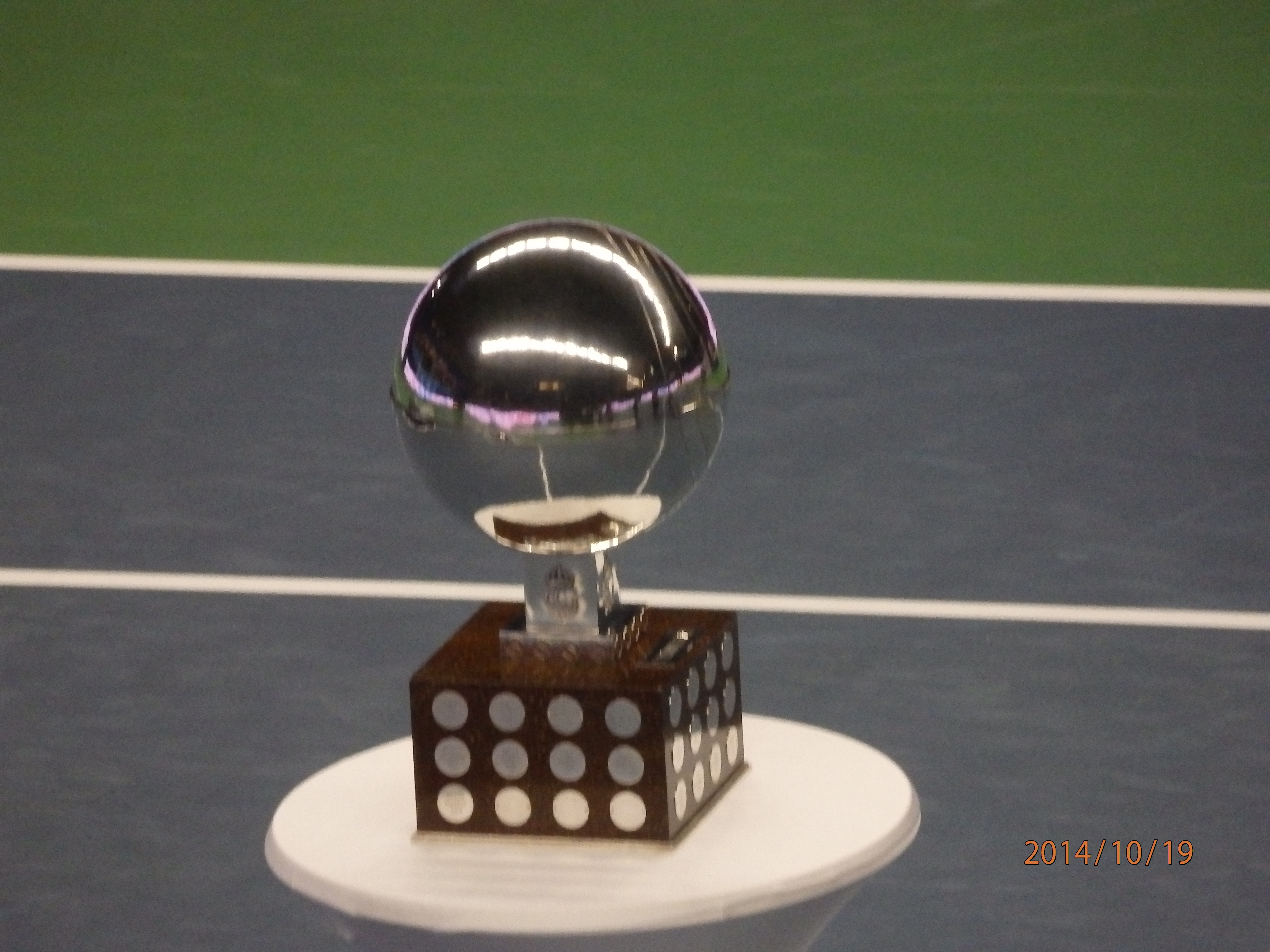 Singeltrofeet Stockholm Open